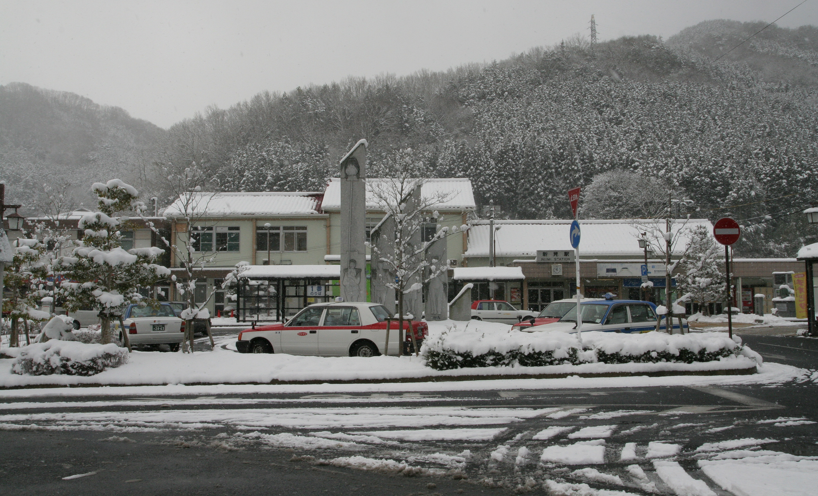 新見駅の駅舎